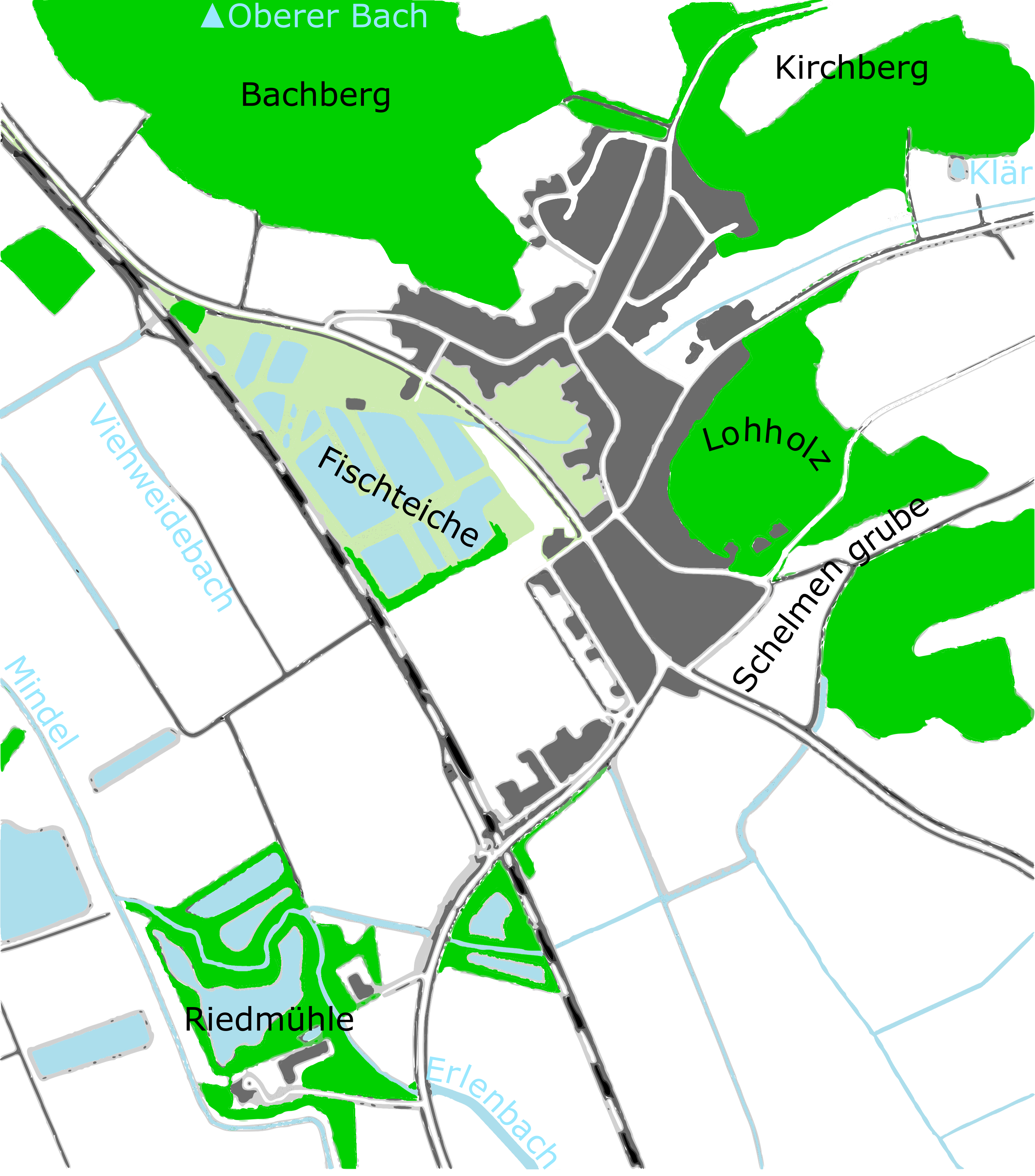 vereinfachte Karte des Gebiets um Mindelaltheim mit einigen Flurnamen